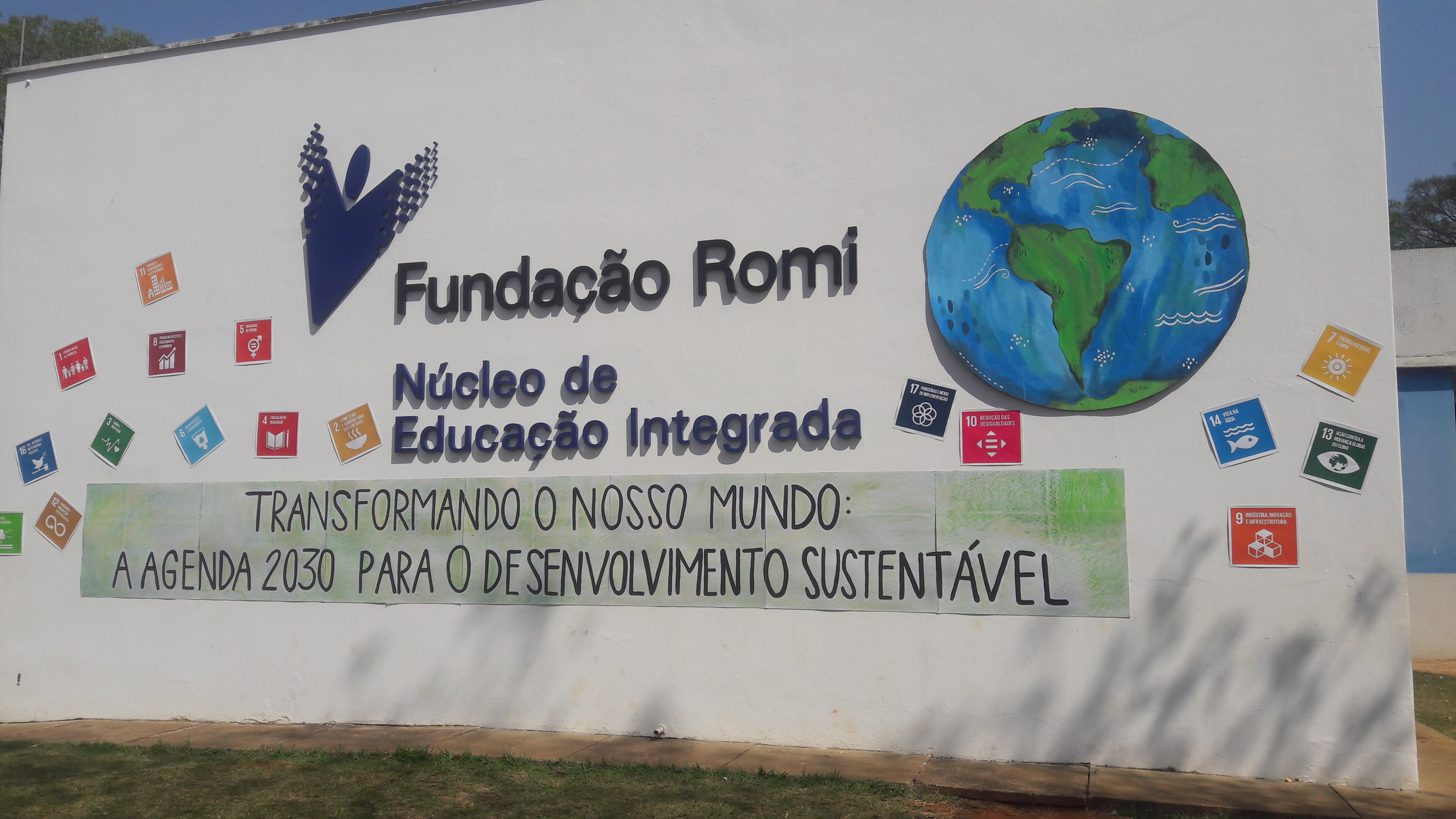 Fachada do Núcleo de Educação Integrada 2019